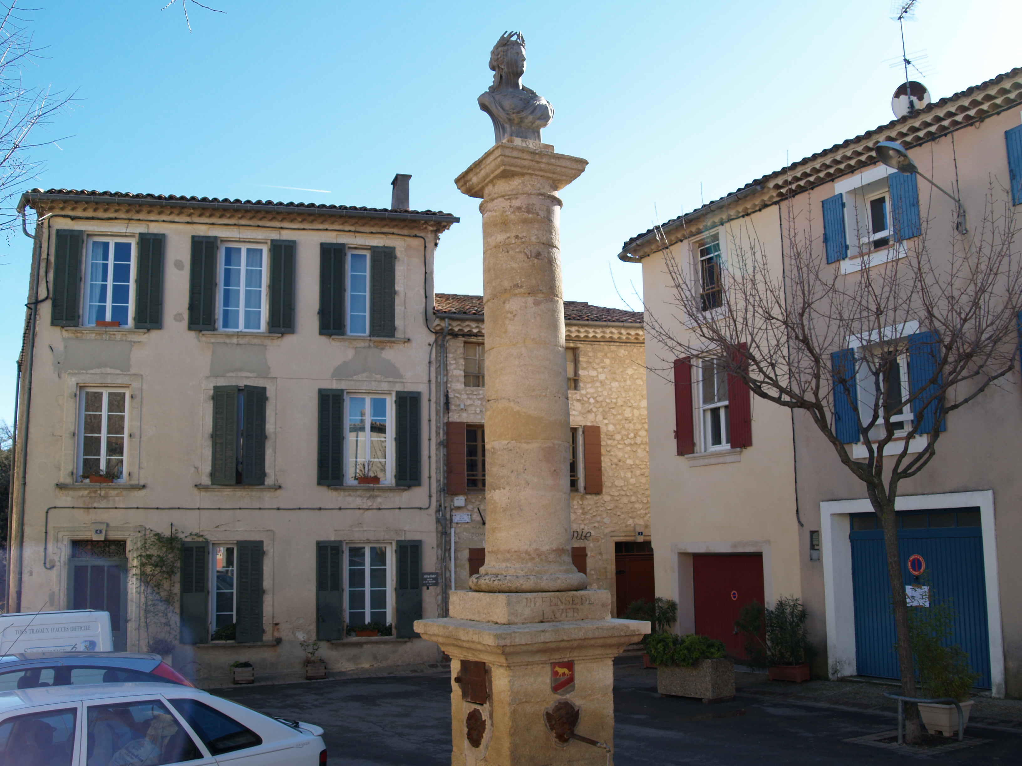 Fontaine à colonne - La Bastide des Jourdans